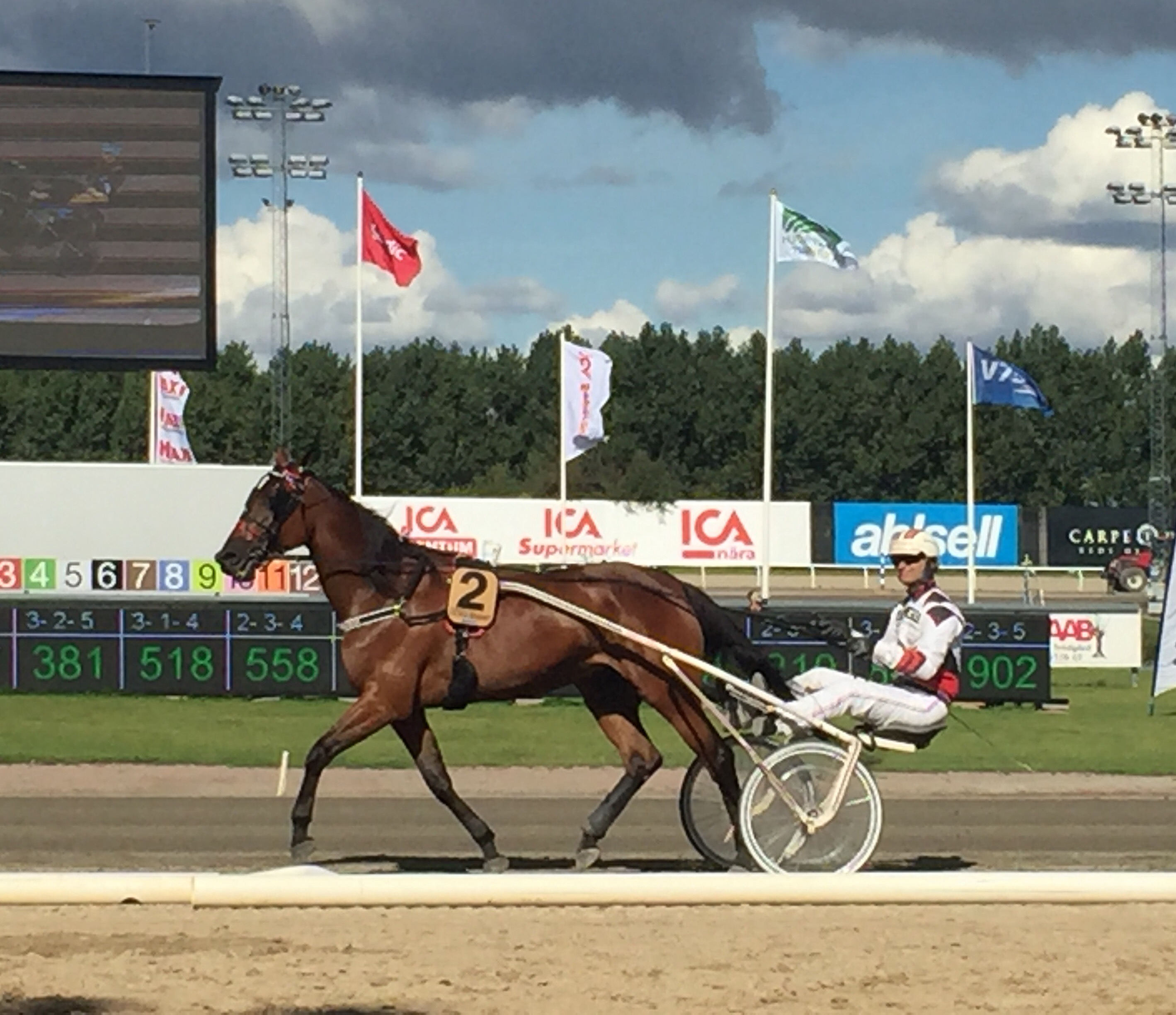 Fredrik Persson och hästen Ultra Bright inför finalen av Derbystoet 2017.